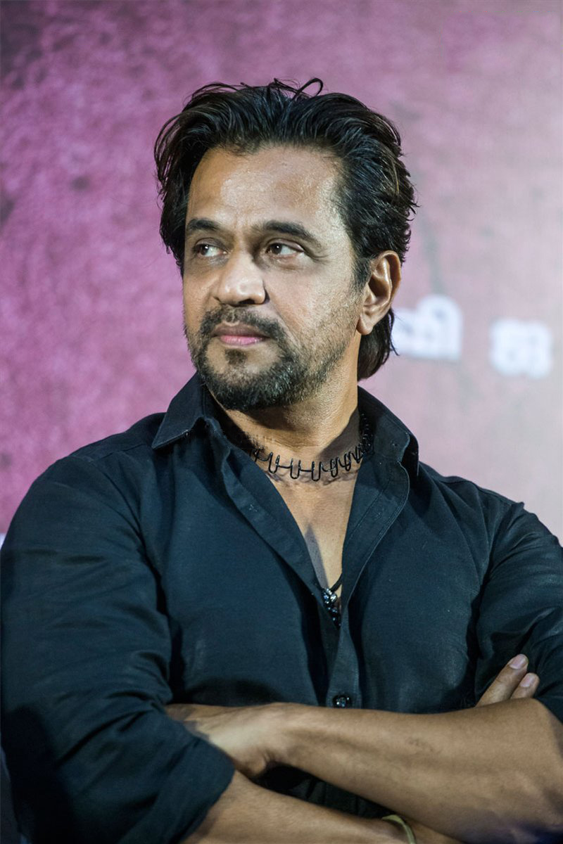 Arjun at the ‘Kolaigaran’ Press Meet